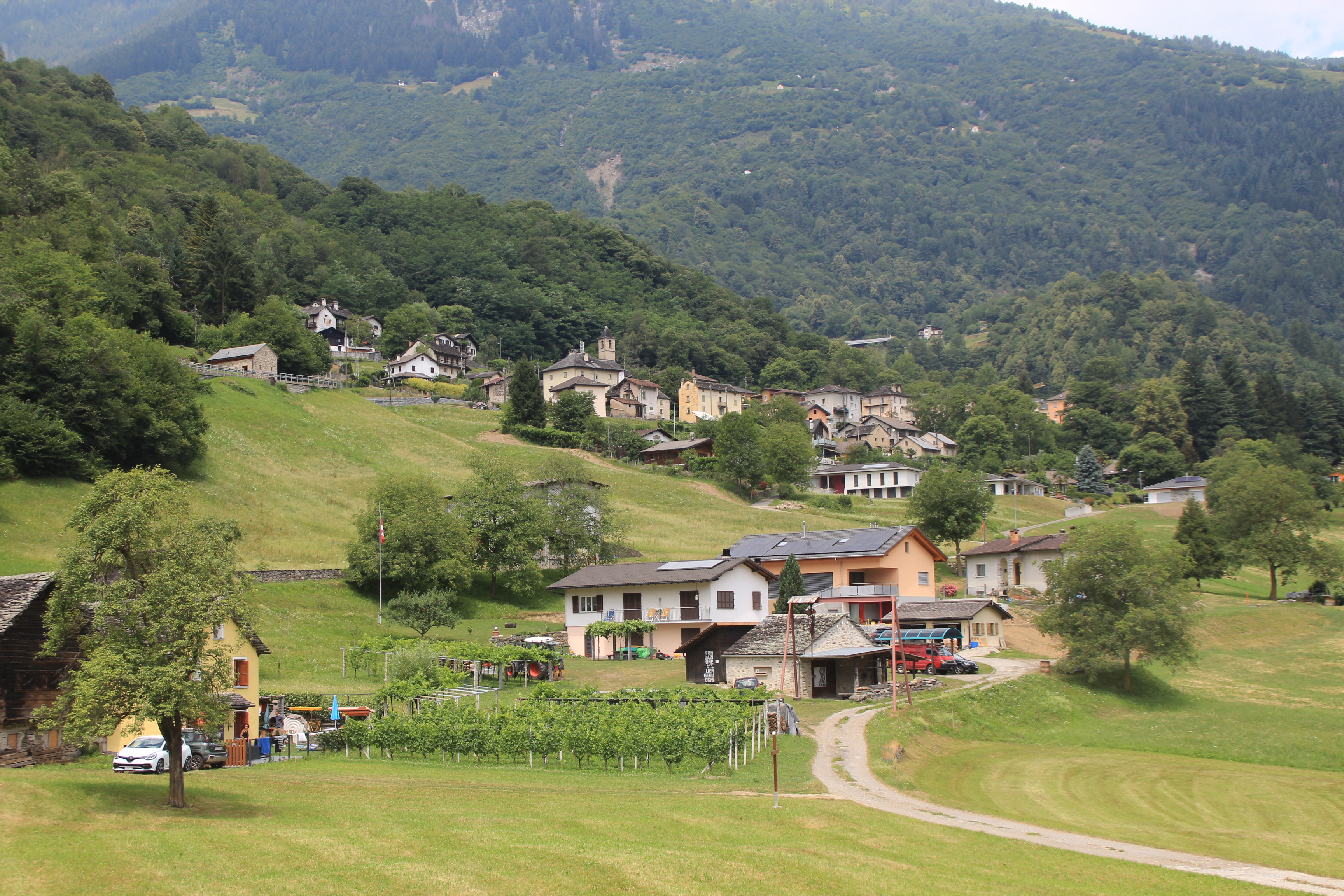 Castro TI